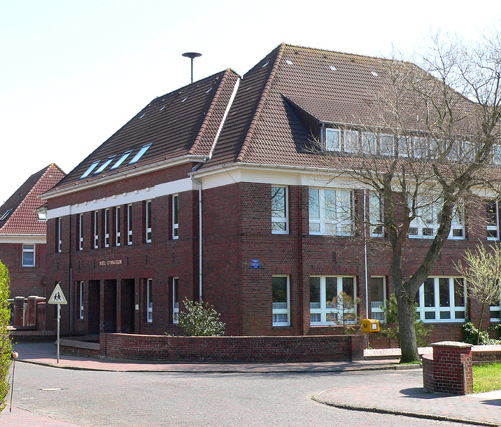 Insel-Gymnasium Wangerooge